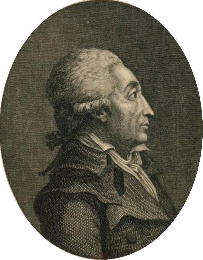 Portrait de Marc-Guillaume Alexis Vadier, entre 1791 et 1799, par le graveur François Bonneville (actif entre 1791 et 1814)